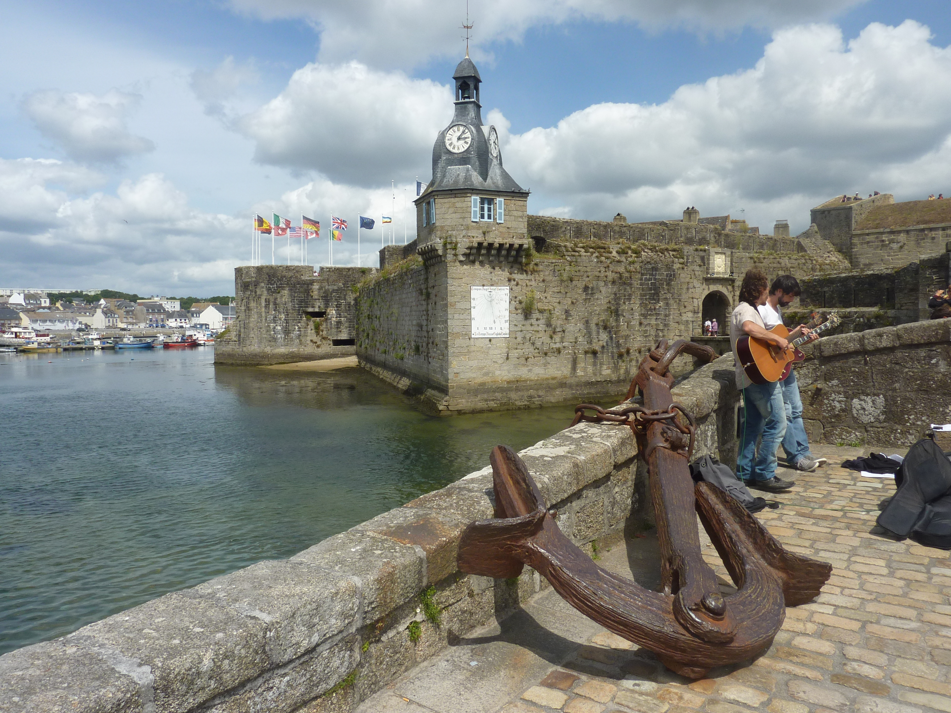 Concarneau : la Tour de l'Horloge à l'entrée de la Ville close